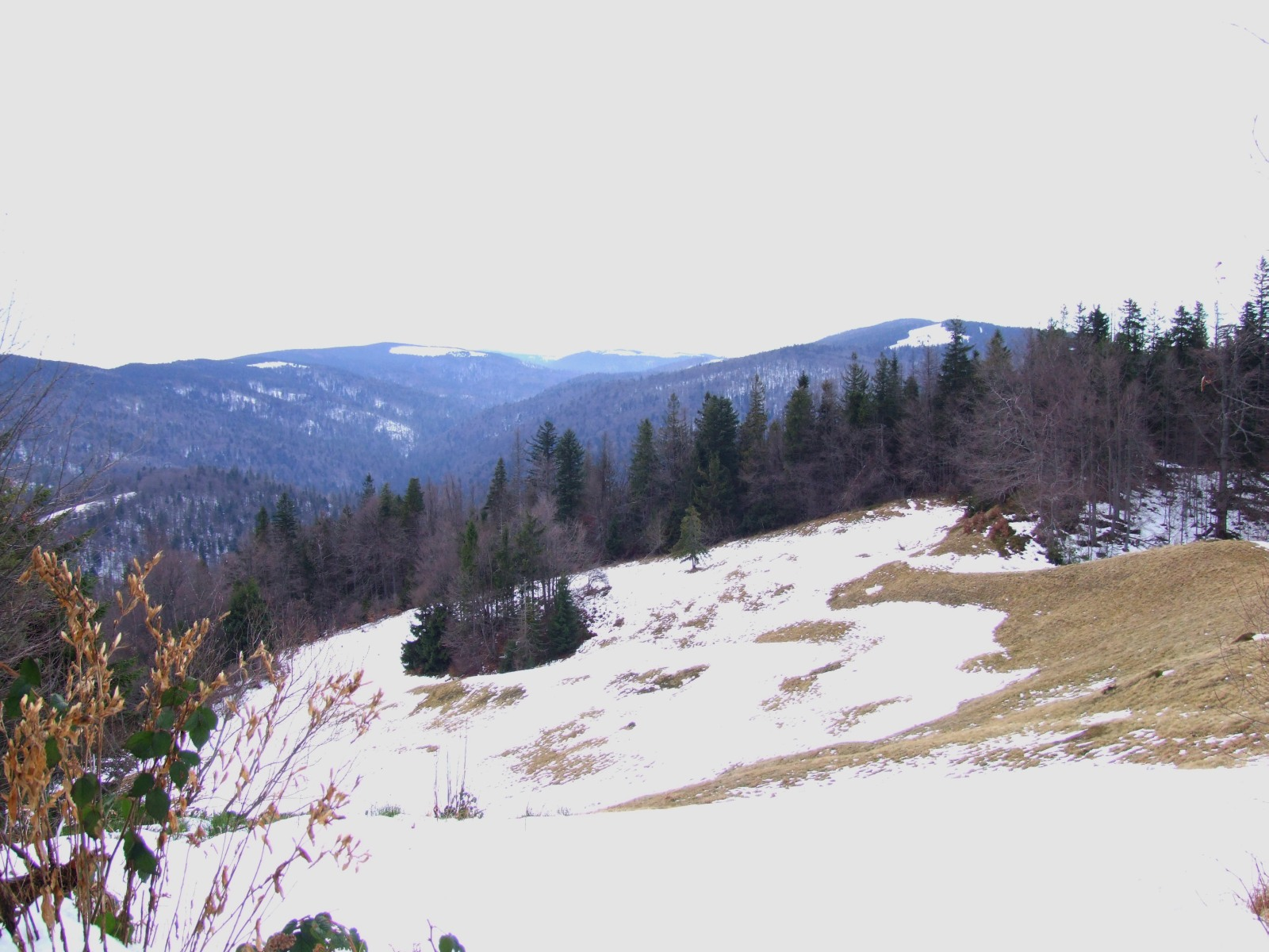 Polana Świnkówka w Gorcach